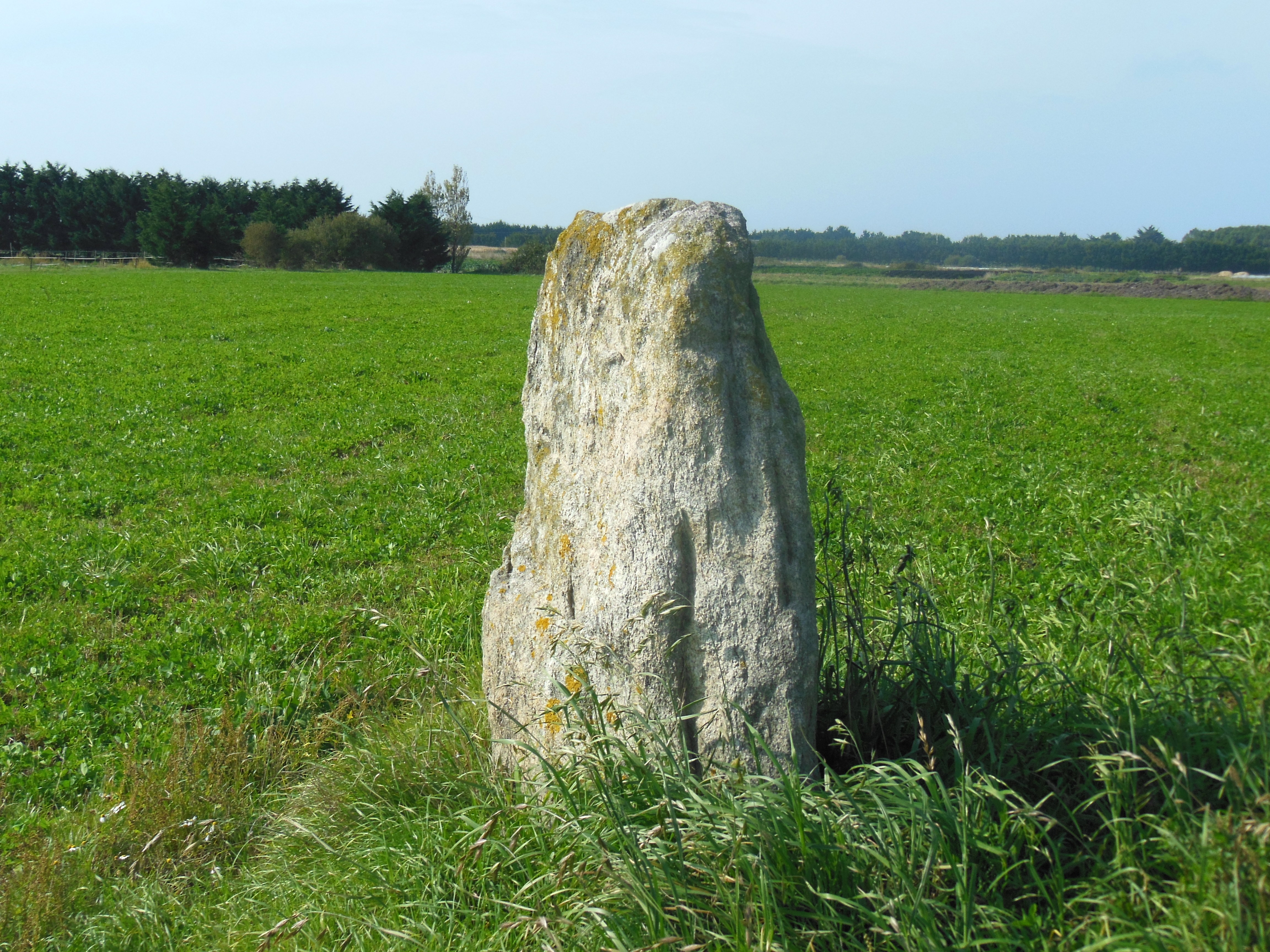 Pierre de Saillé, menhir situé dans le village de Saillé, sur la commune de Guérande